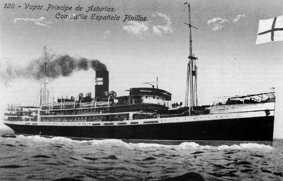 Vapor Principe de Asturias